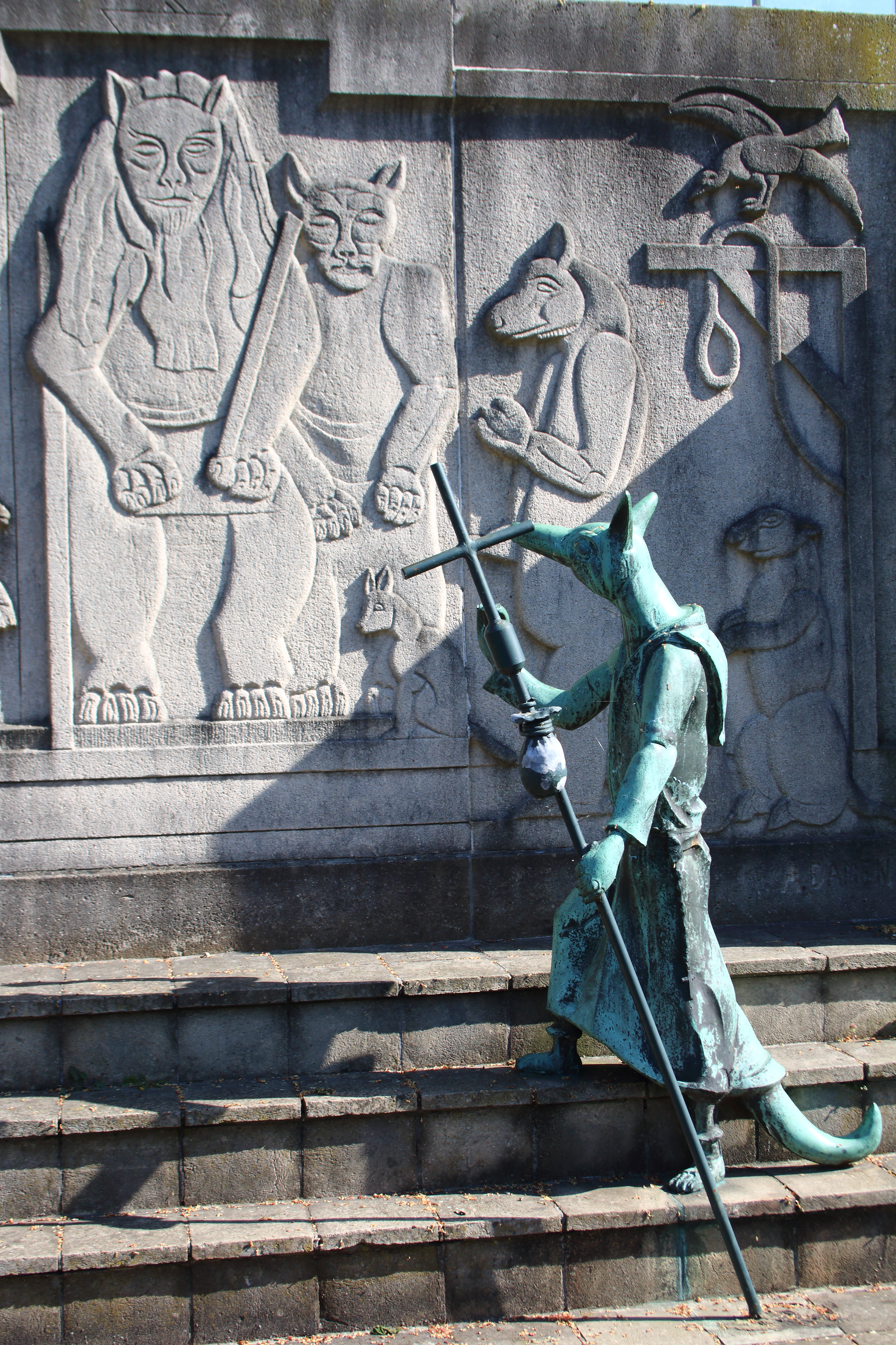 Reynaertmonument, Hulst, Zeeuws-Vlaanderen, Zeeland, Nederland